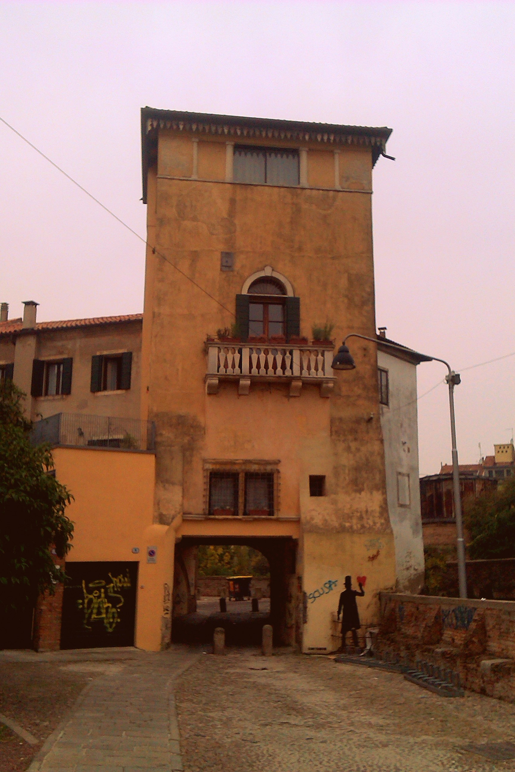 Fortificazione del Soccorso, Padova